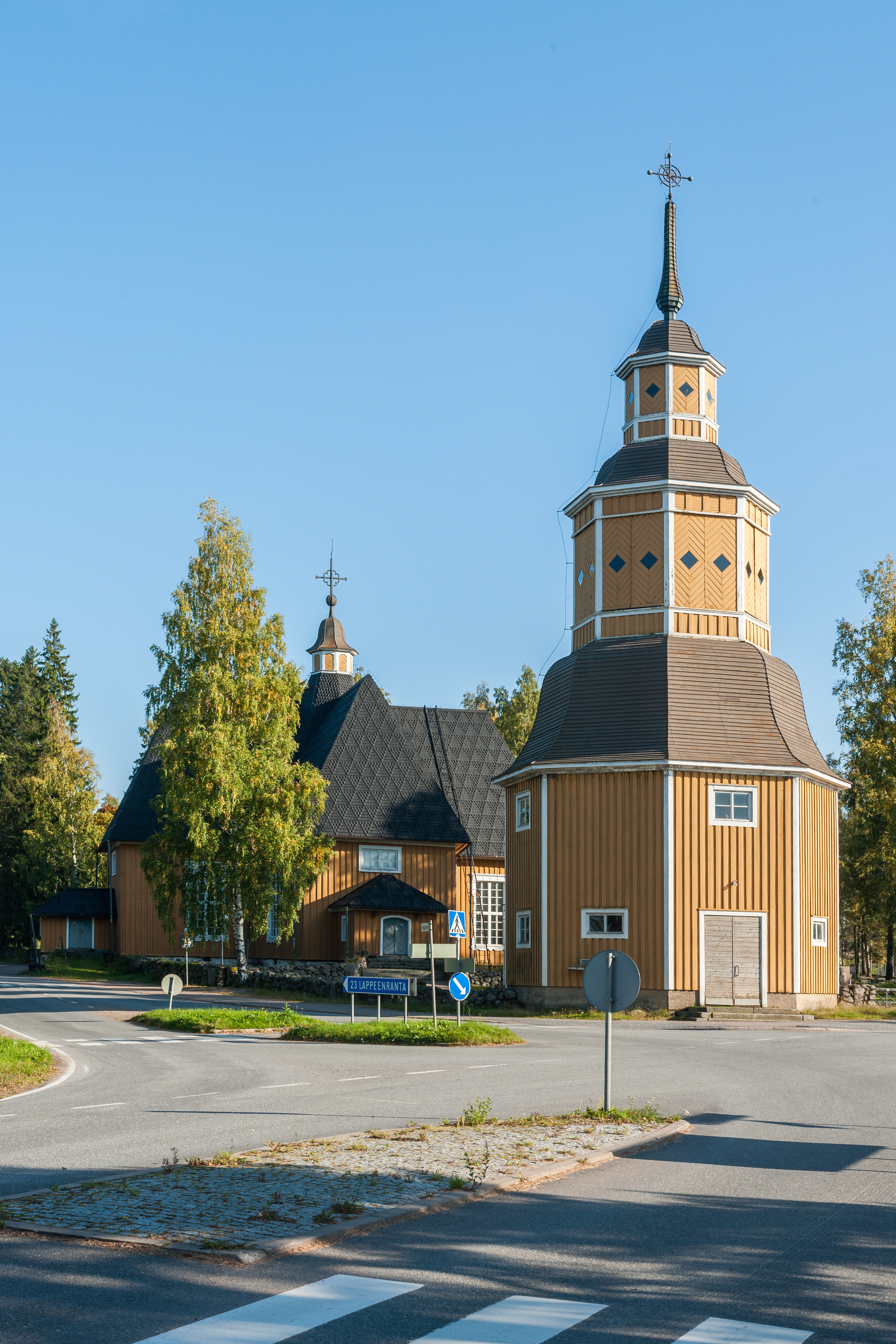 Lemin kirkko; kirkko Lemillä